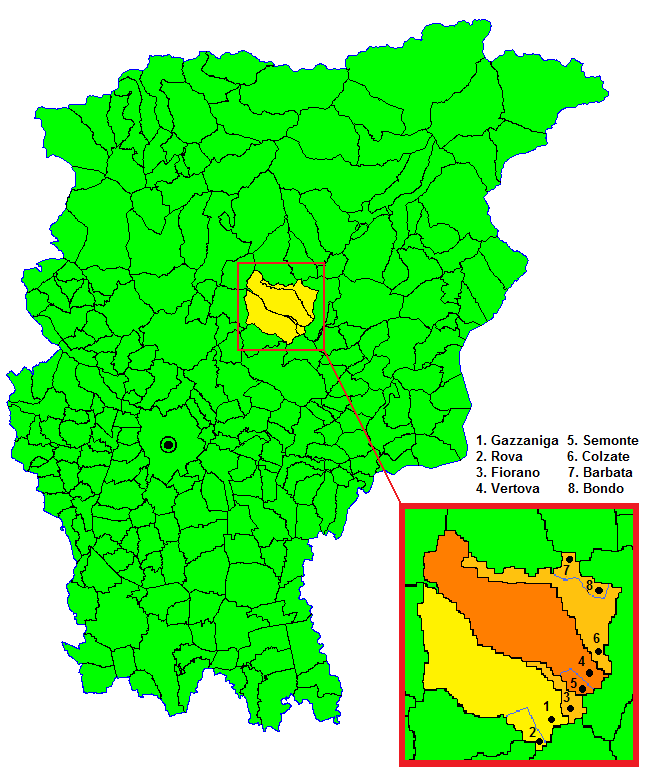 Territori della Confederazione de Honio in epoca medievale